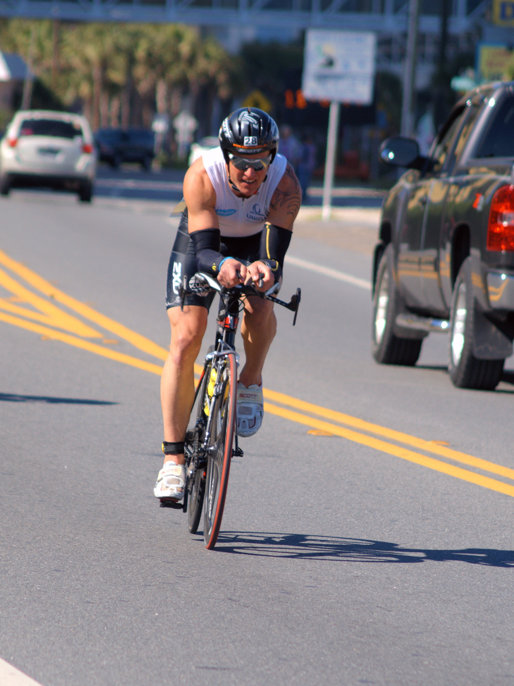 Markus Strini at Ironman Florida 2010